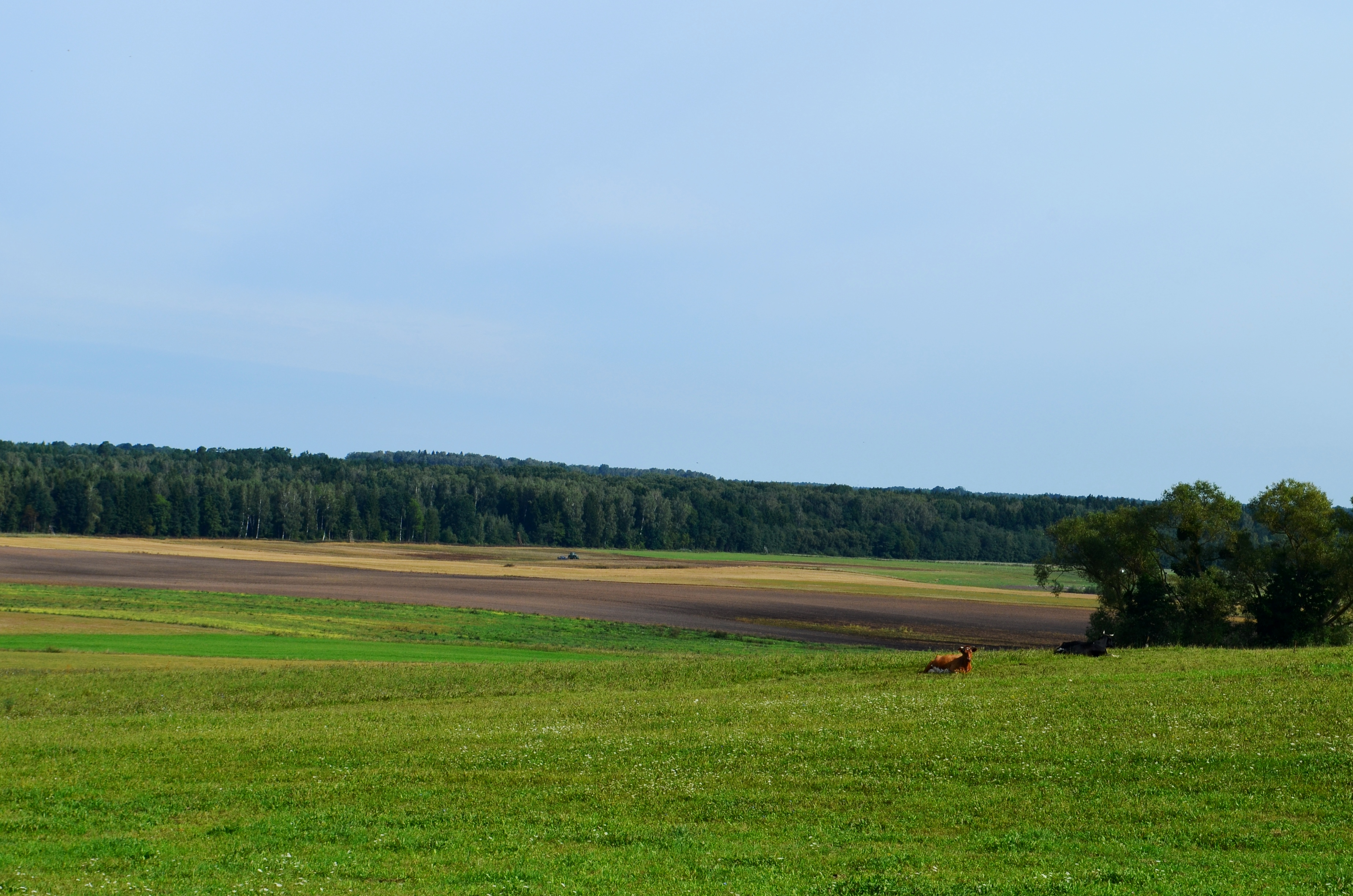 Klebiškio miškas nuo Patelviškio, Prienų raj.